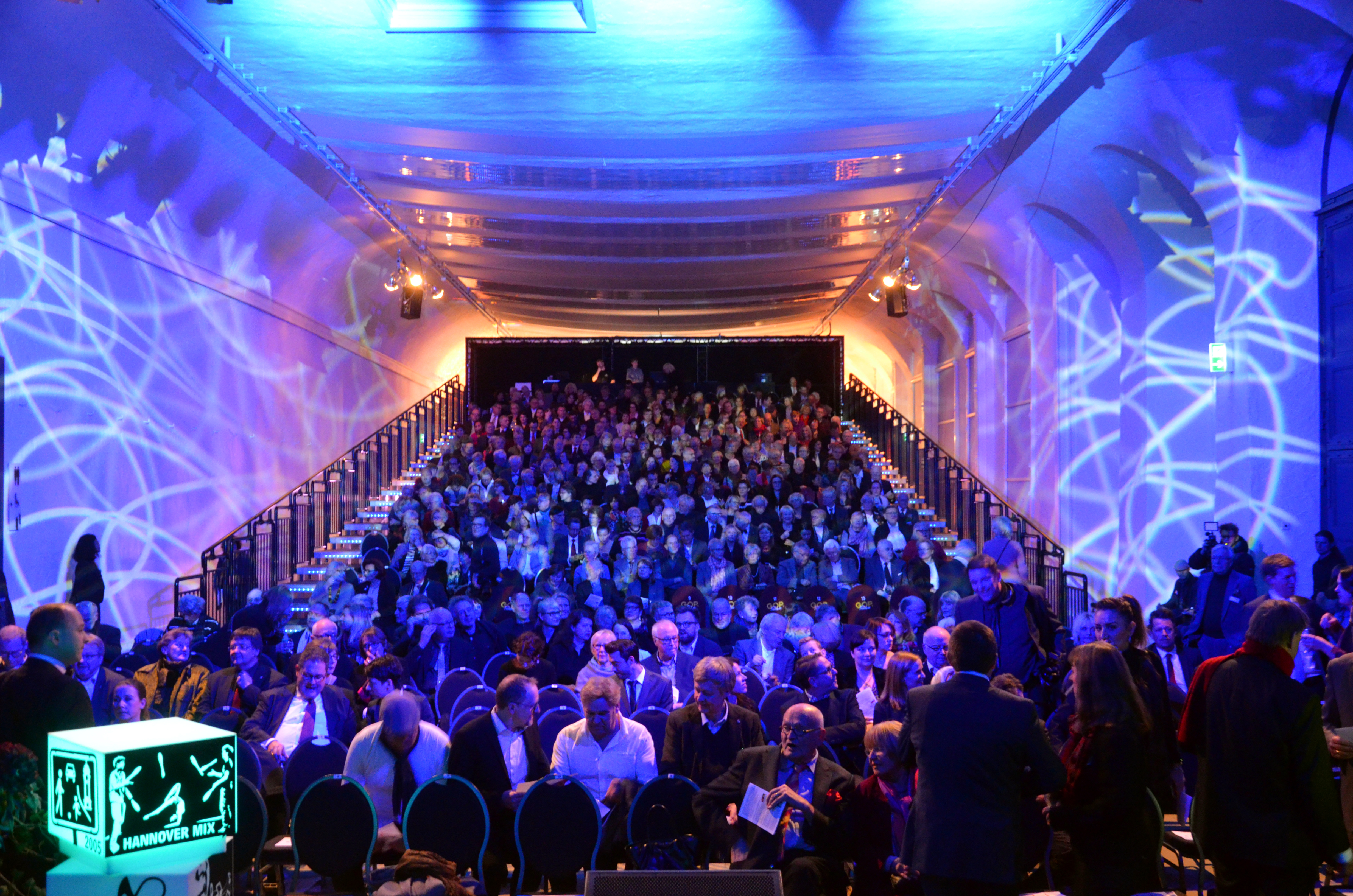 Blick von der Bühne des GOP-Wintervarietés WET - the Show in der Orangerie von Herrenhausen kurz vor Beginn der Feierlichkeiten zur Verleihung des Stadtkulturpreises und des Sonderpreises für herausragendes bürgerschaftliches Engagement durch den Freundeskreis Hannover vor rund 600 geladenen Gästen am 6. Dezember 2016...